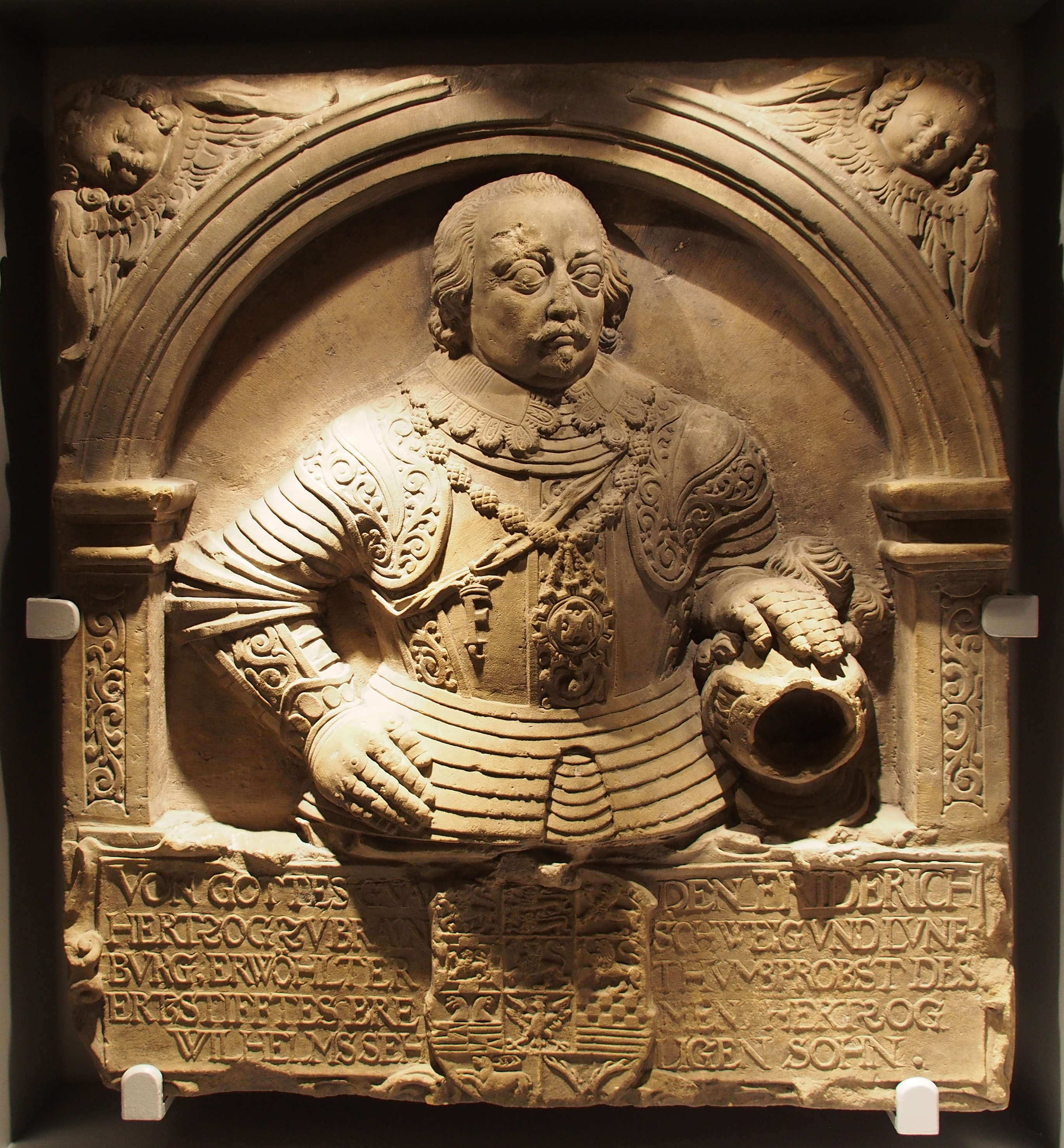 Sandstein-Relief von Herzog Friedrich zu Braunschweig und Lüneburg - geschaffen Mitte des 17. Jahrhunderts. Zu sehen im Residenzmuseum im Celler Schloss.